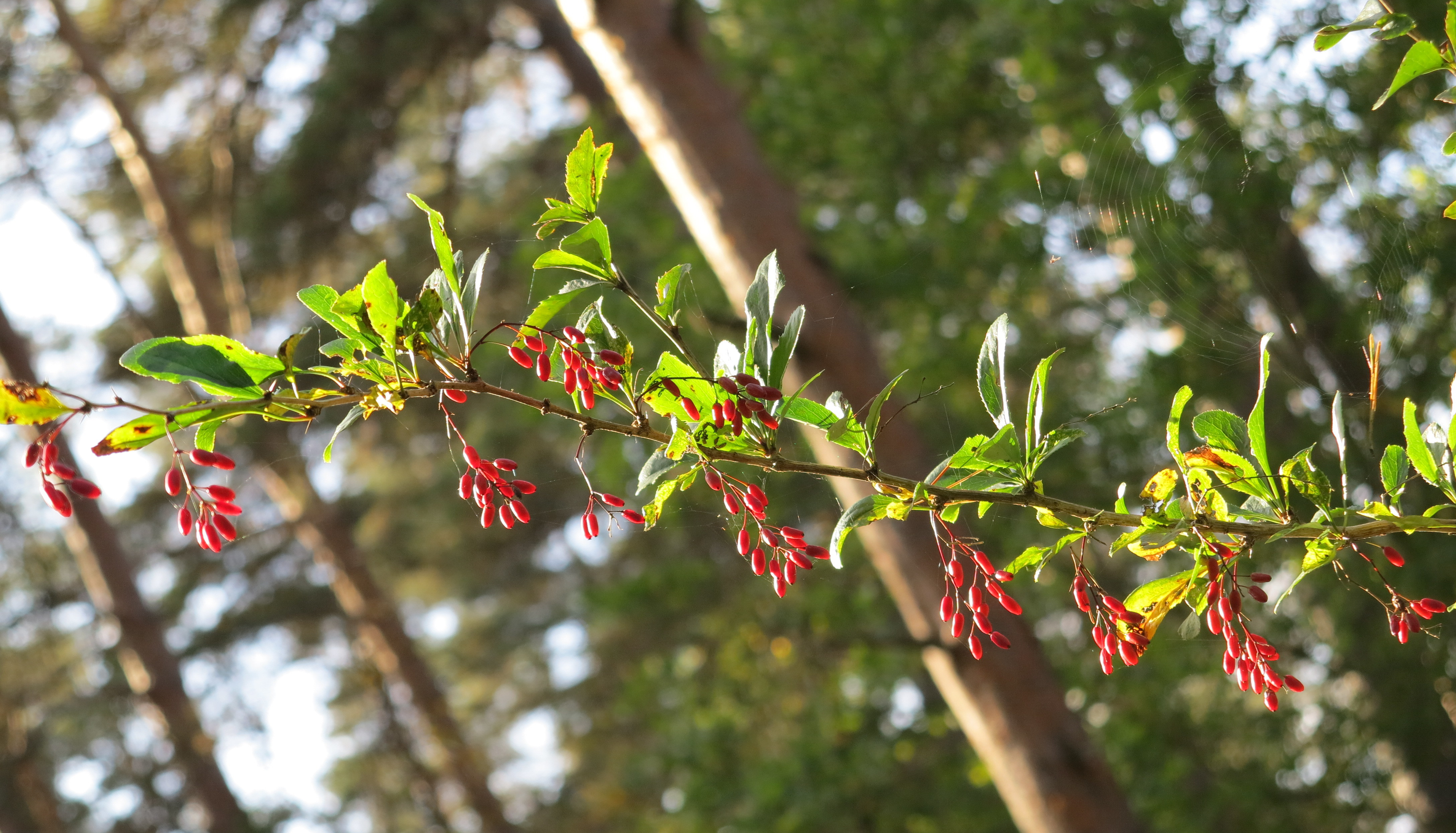 Kukerpuud on üks iseloomulikumaid põõsaliike Aruküla männikus Raasiku vallas